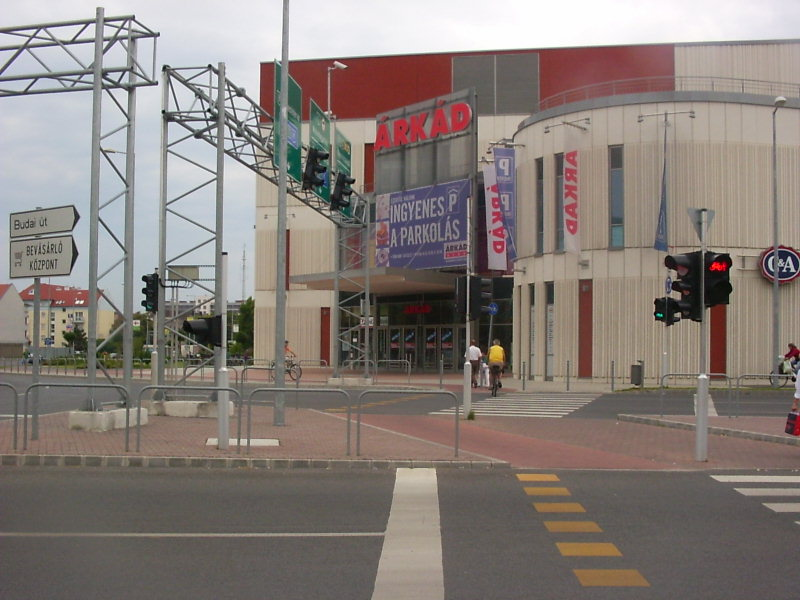 Az Árkád üzletközpont bejárata (Győr)